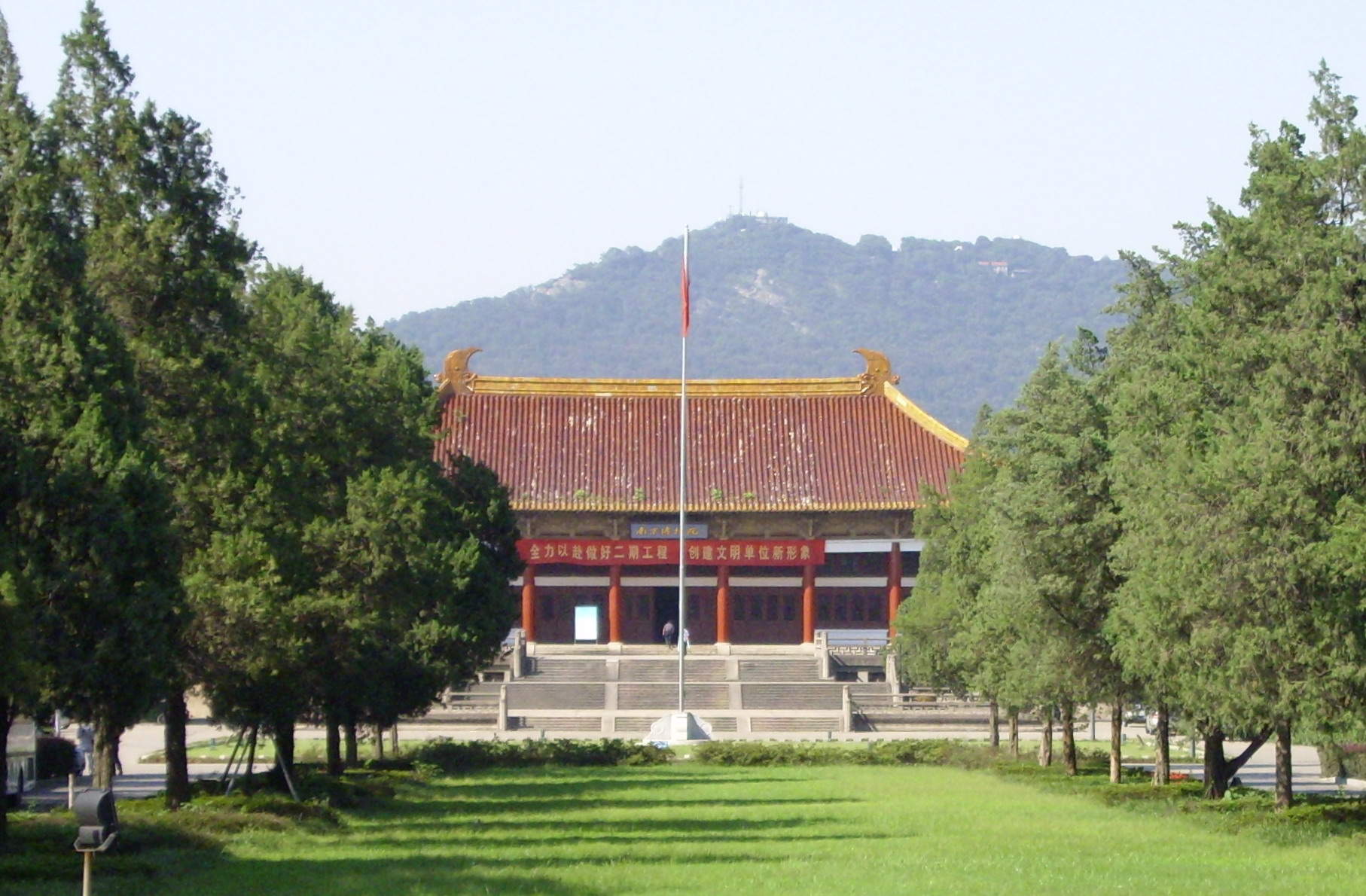 南京博物院前视图，背景为zh:紫金山